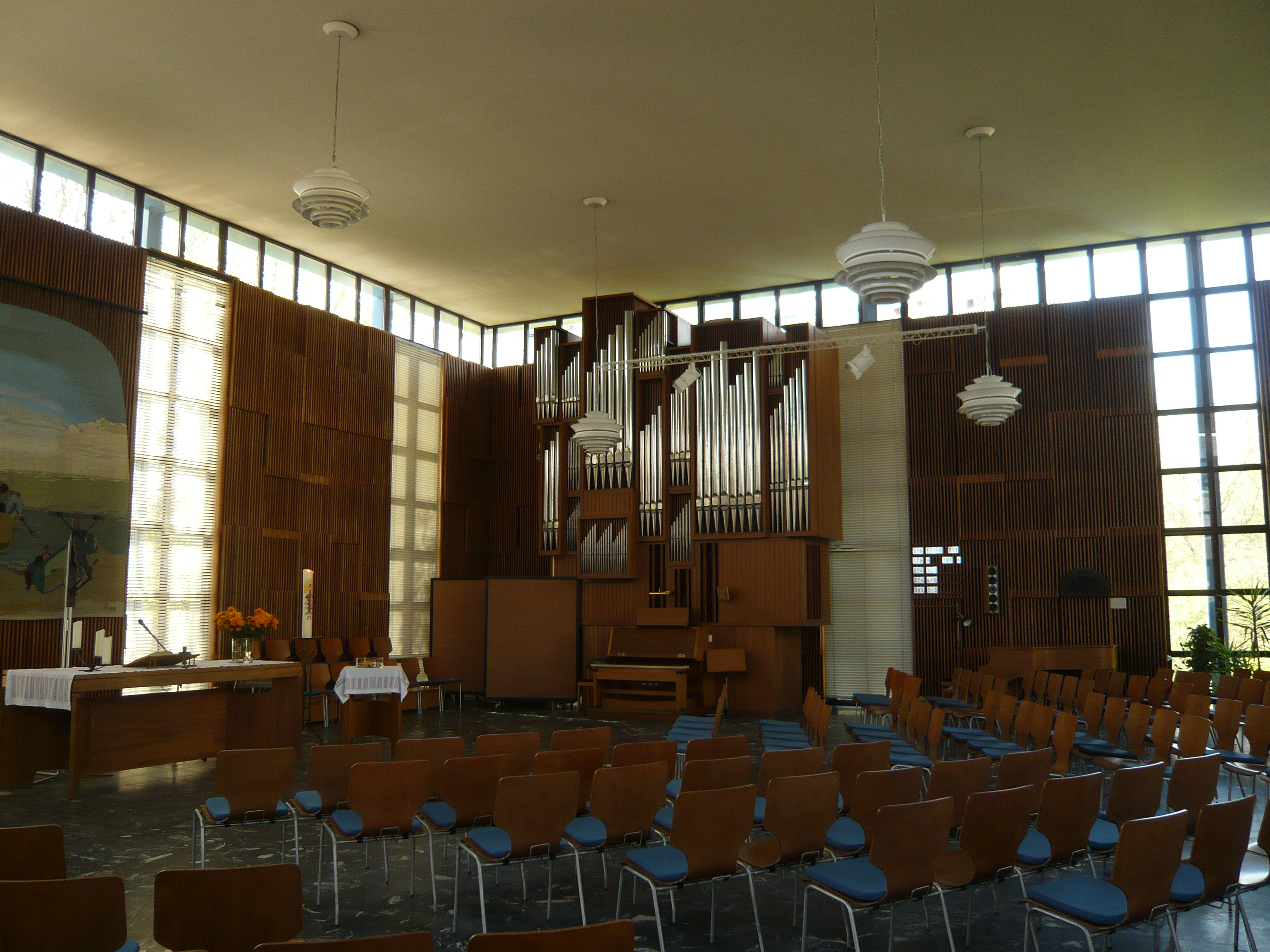 Berlin-Gropiusstadt, Martin-Luther-King-Gemeinde